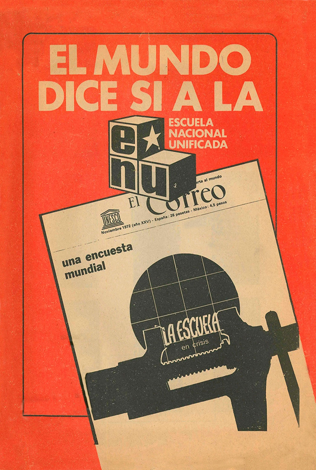 El mundo dice sí a la Escuela Nacional Unificada (ENU): informe UNESCO.